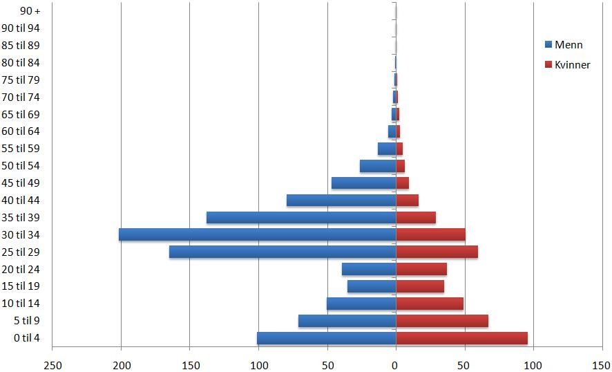 De Forente Arabiske Emiraters befolkningspyramide fra 1986 (per tusen)